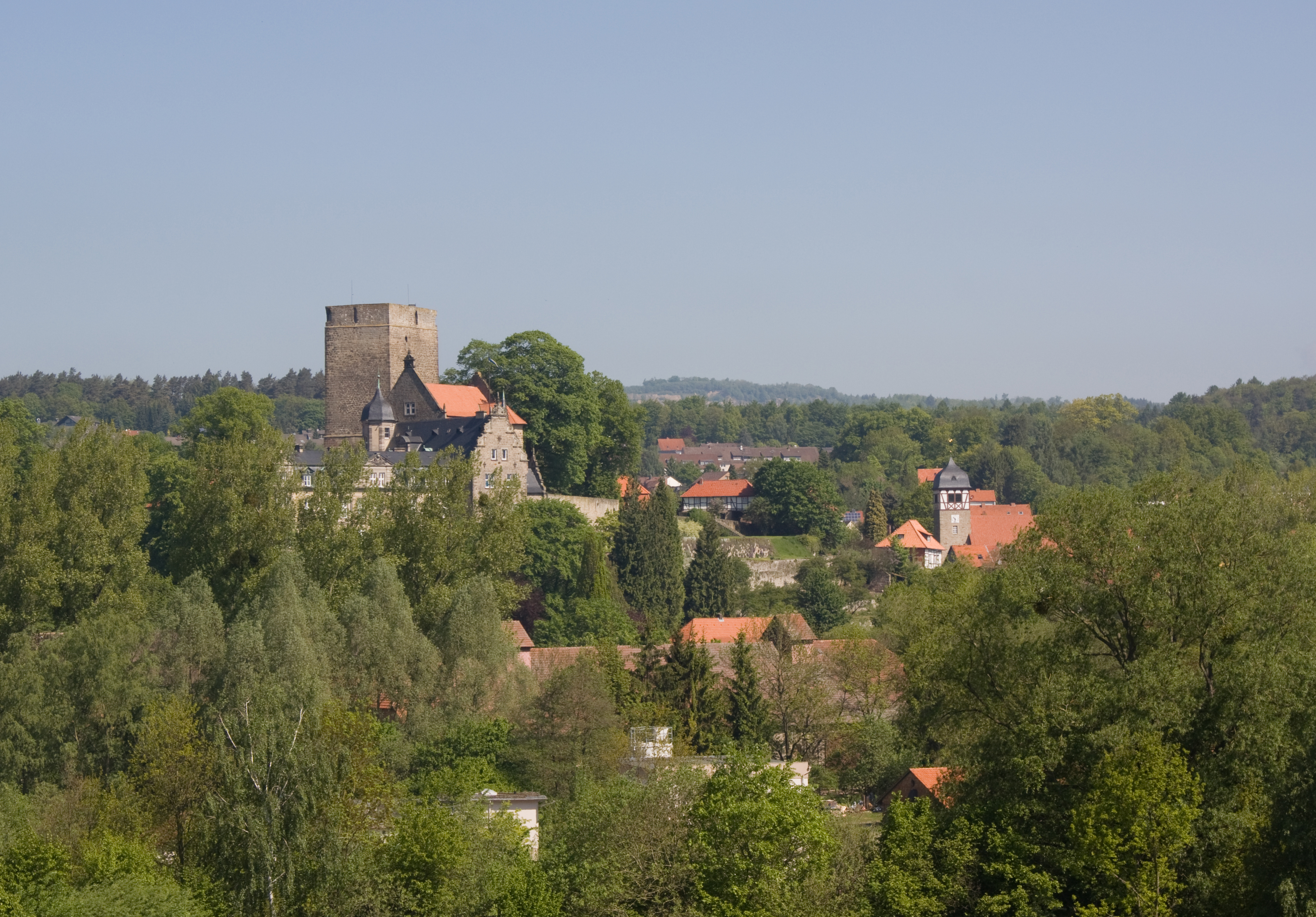 Burg Adelebsen